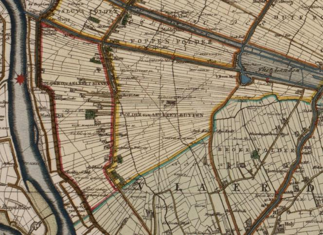 Alkeet polder (binnen en buiten)